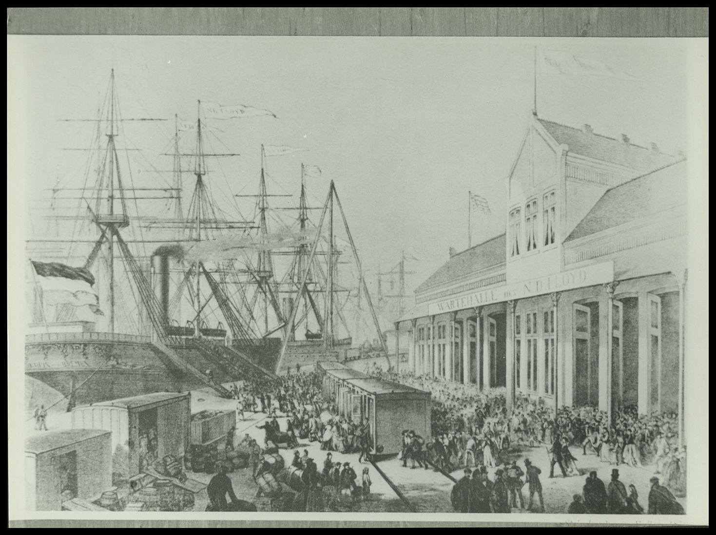 Legenda: Gravura do porto de Bremen, c. 1870 Tema: Não consta Local: Não consta Data: 1870 Formato: 18x24cm Material: Ampliação, pb, gelatina e prata Nº Topográfico: MI_ICO_AMP_008_001_081_001 Autor: Não consta Palavra-chave: gravura, porto, Bremen (ALE)